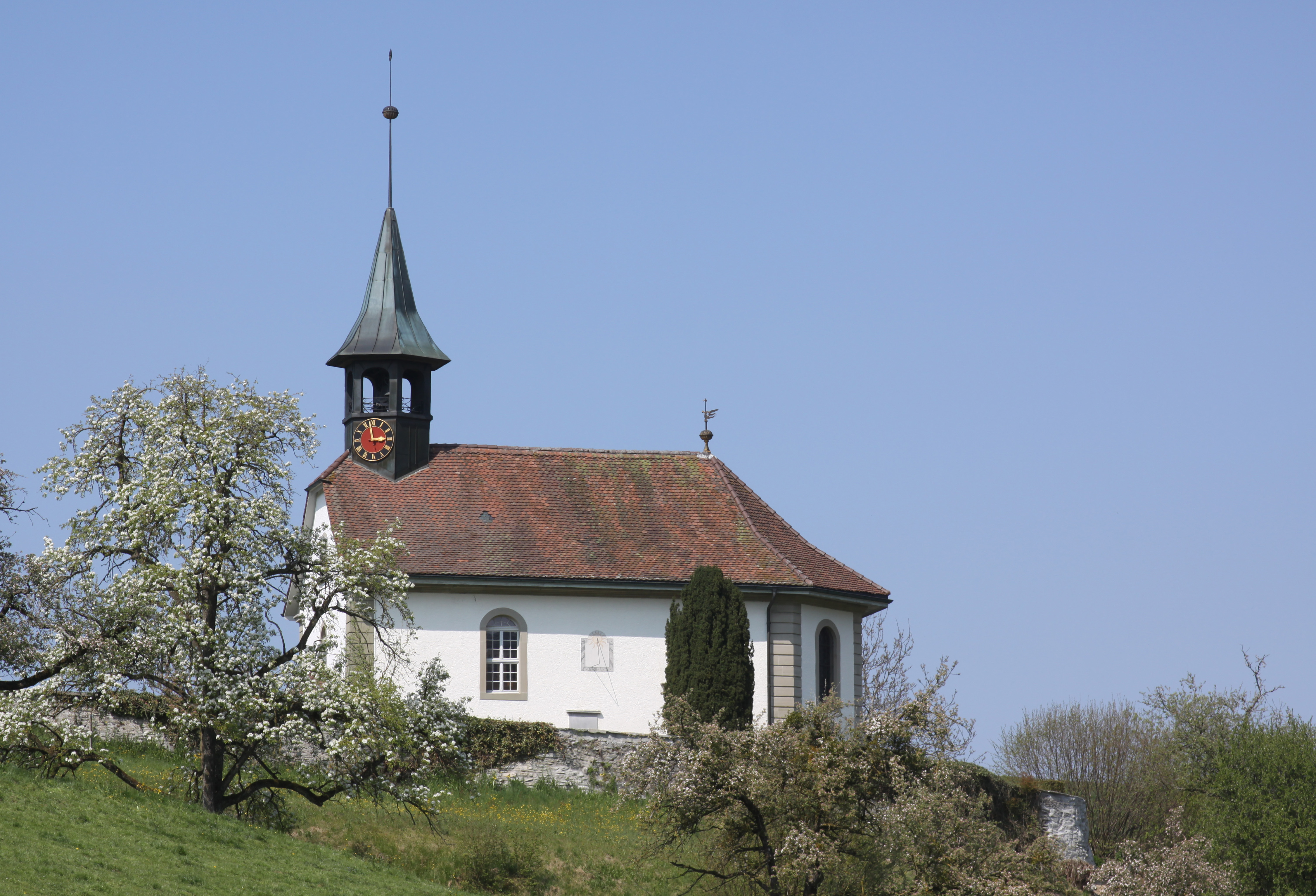 Kirche Walterswil